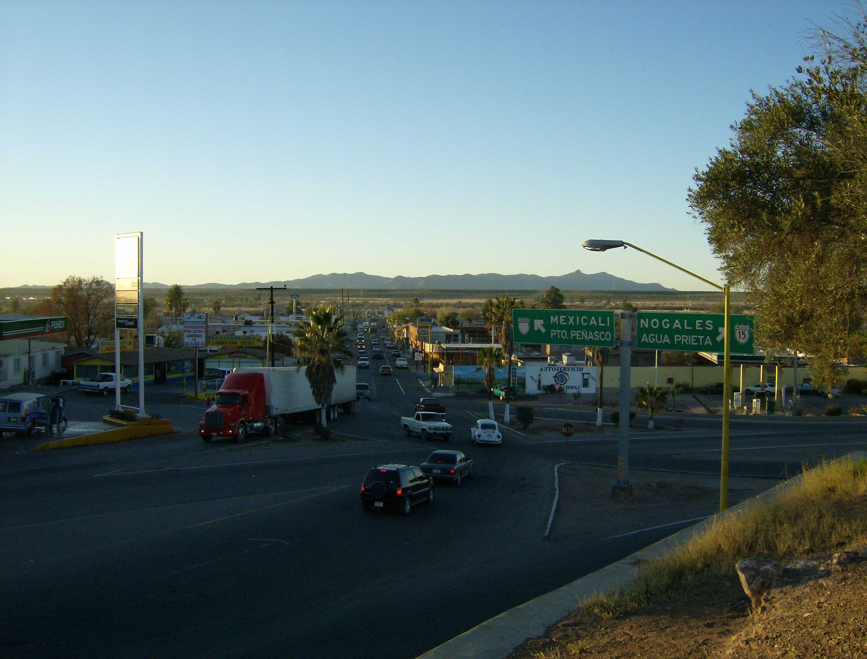 Llave del Desierto, Santa Ana, Sonora, México.